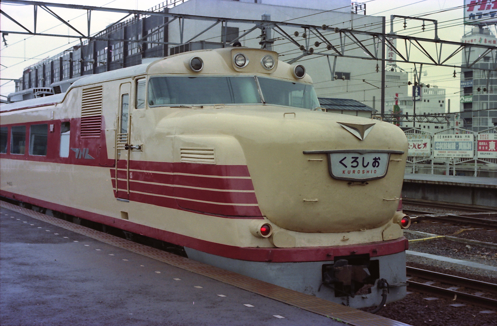 和歌山駅 特急 くろしお